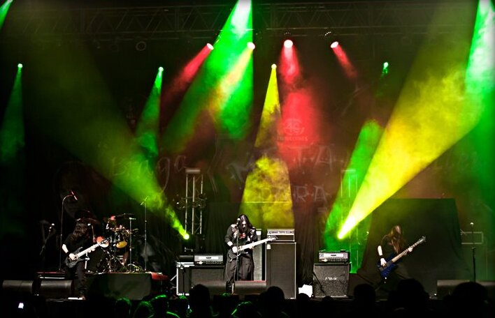 Black